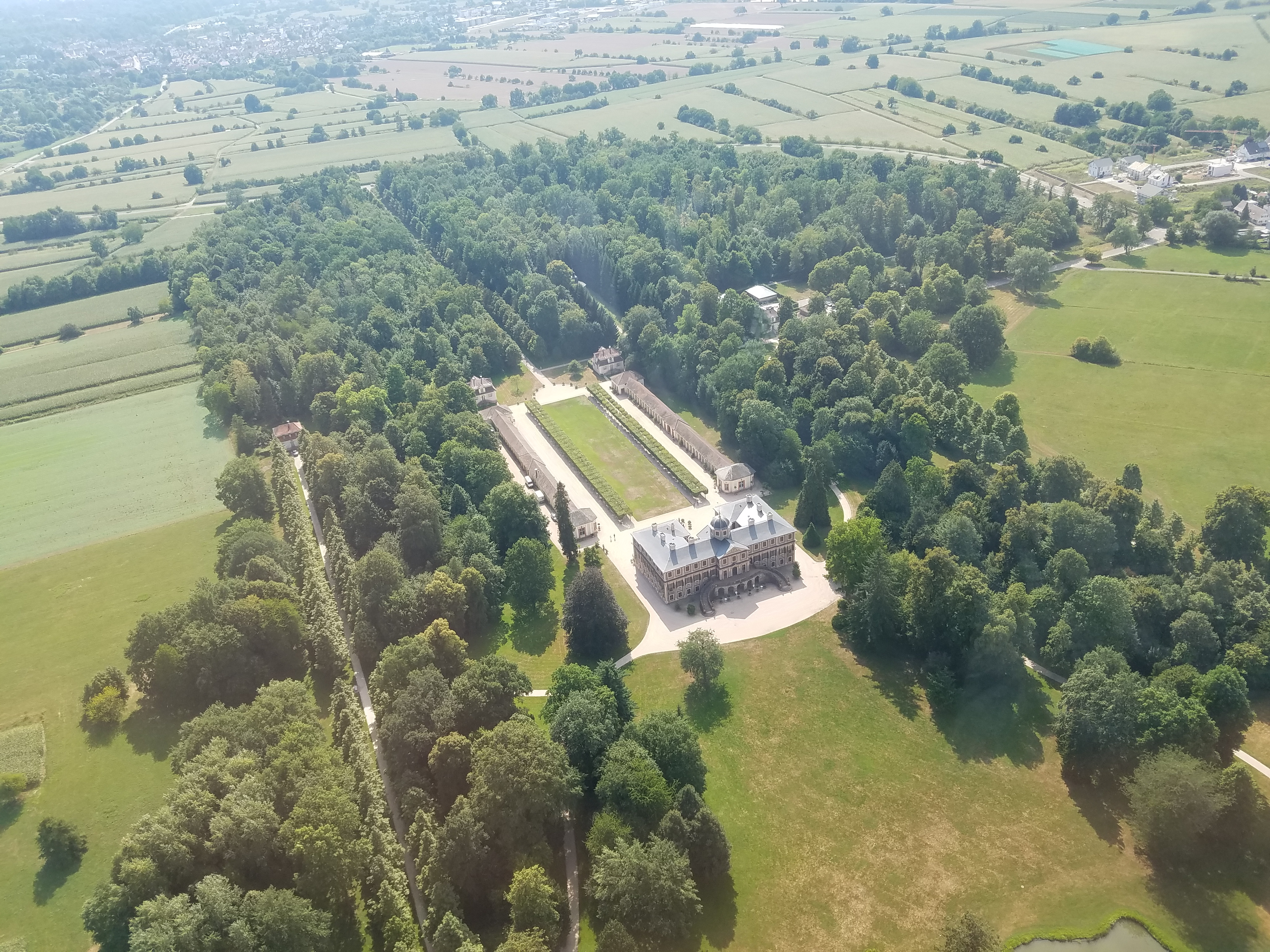 Luftaufnahme vom Schloss Favorite von Nordosten aus